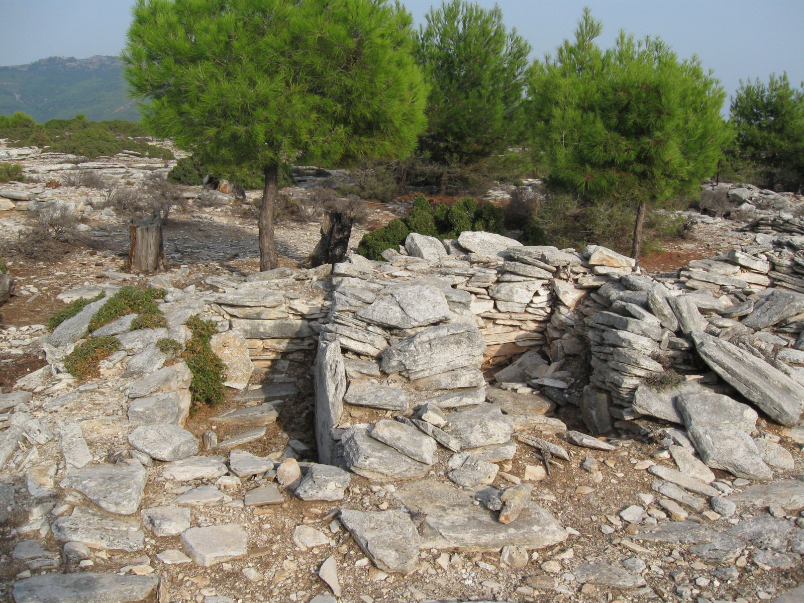 Steinkistengräber im Gräberfeld Larnaki